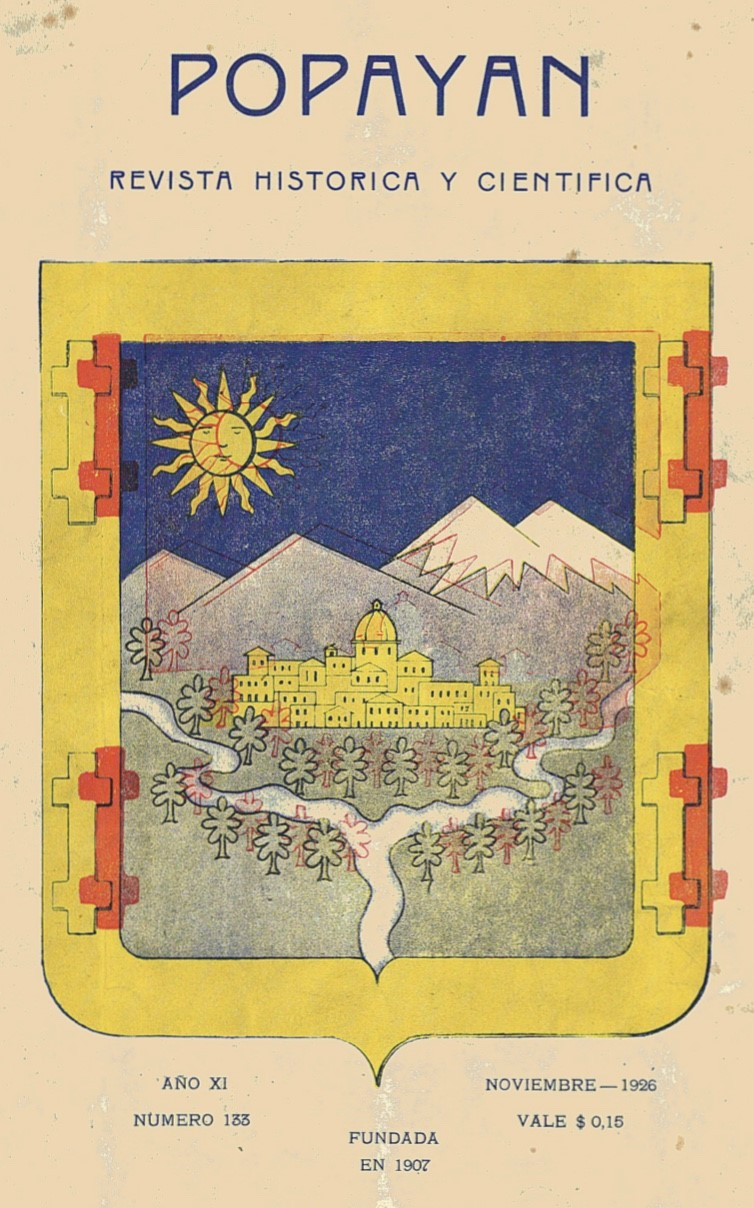 Portada de la revista Popayán, ejemplar de noviembre de 1926